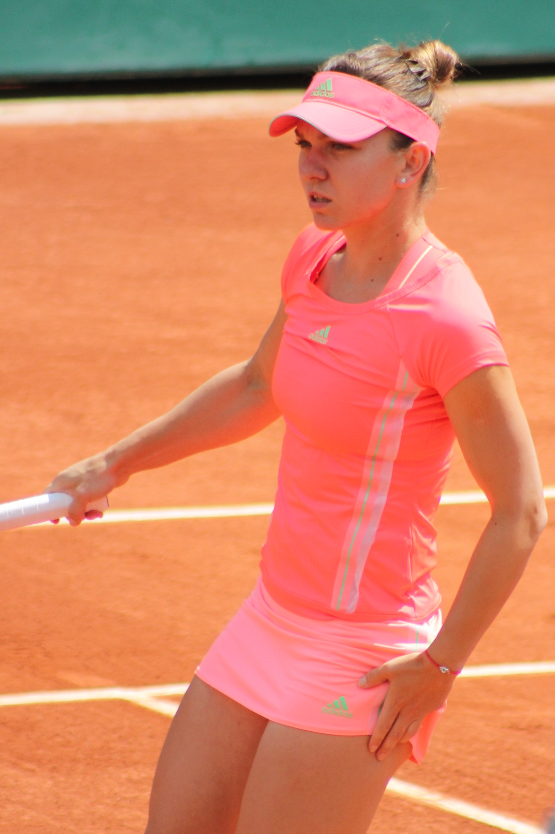 Halep RG15 (8)